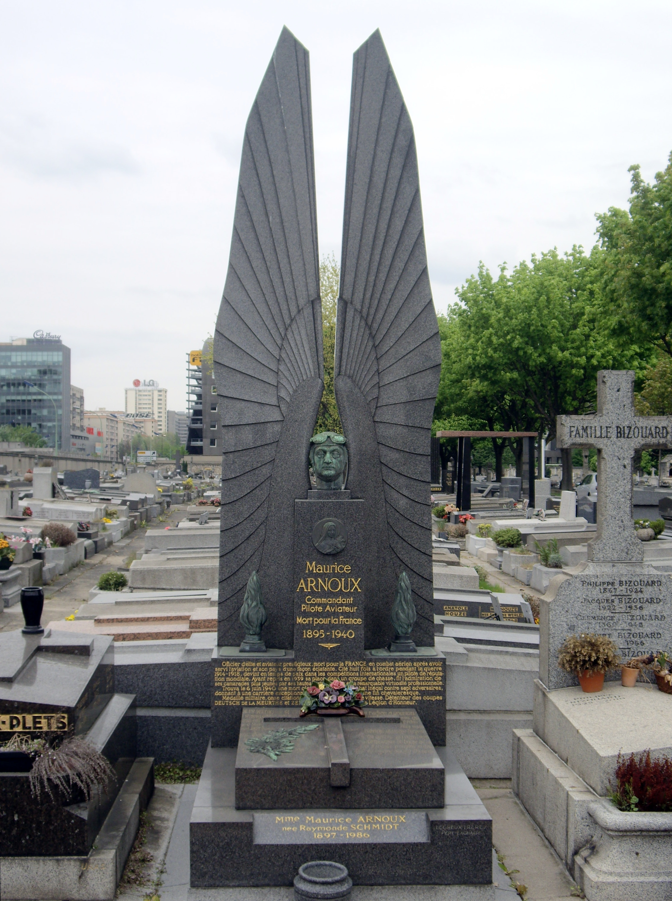 Tombe de Maurice Arnoux, cimetière de Montrouge, division 66.